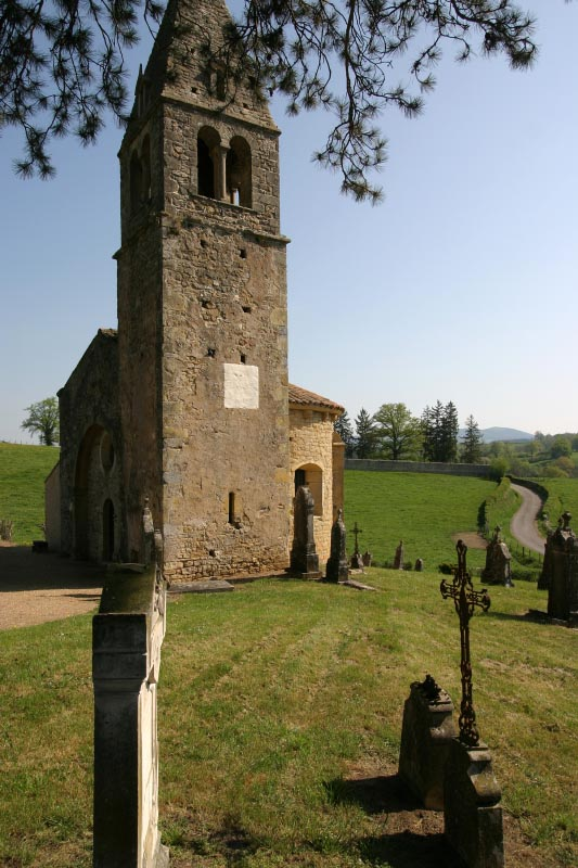 Choeur et clocher de la chapelle du cimetière de Saint-Maurice-lès-Châteauneuf